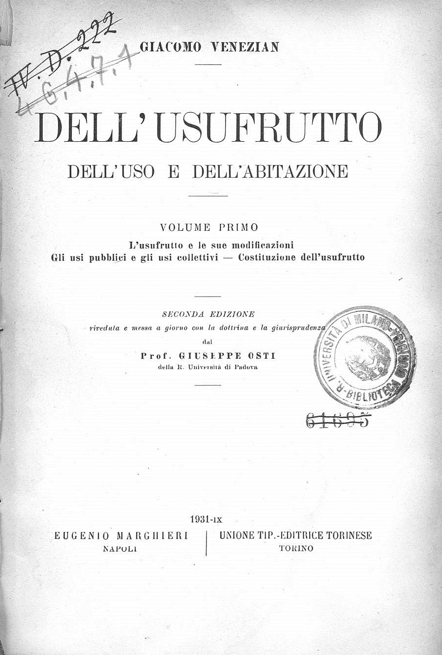 Frontespizio